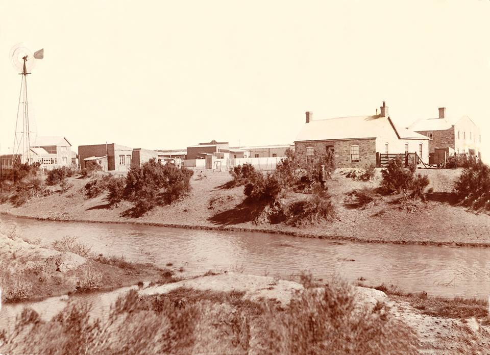 La casa del ingeniero Edward Jones Williams, el primer intendente de Trelew. en 1904. El canal de riego ahora es una calle.